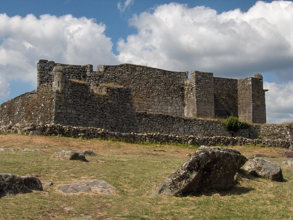 Lindoso Castle, Portugal